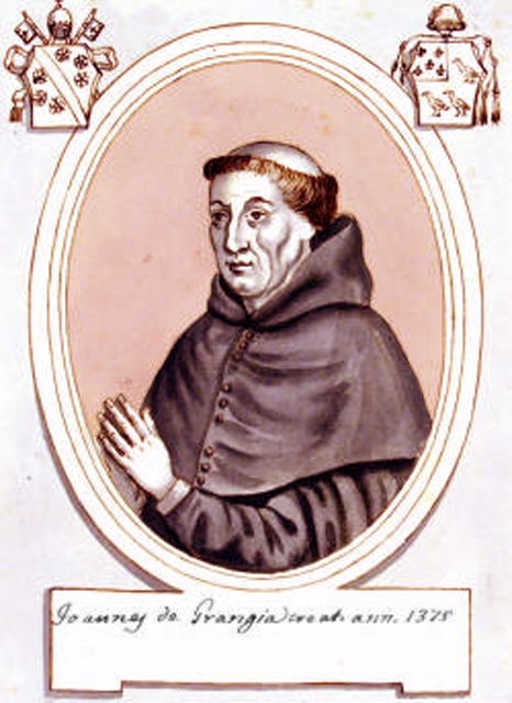 Cardinal Jean de La Grange